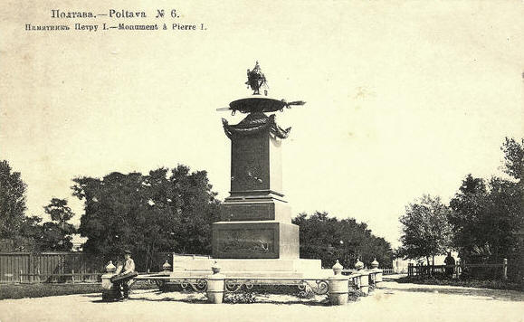 Пам'ятник на місці відпочинку Петра І, початок 20 століття